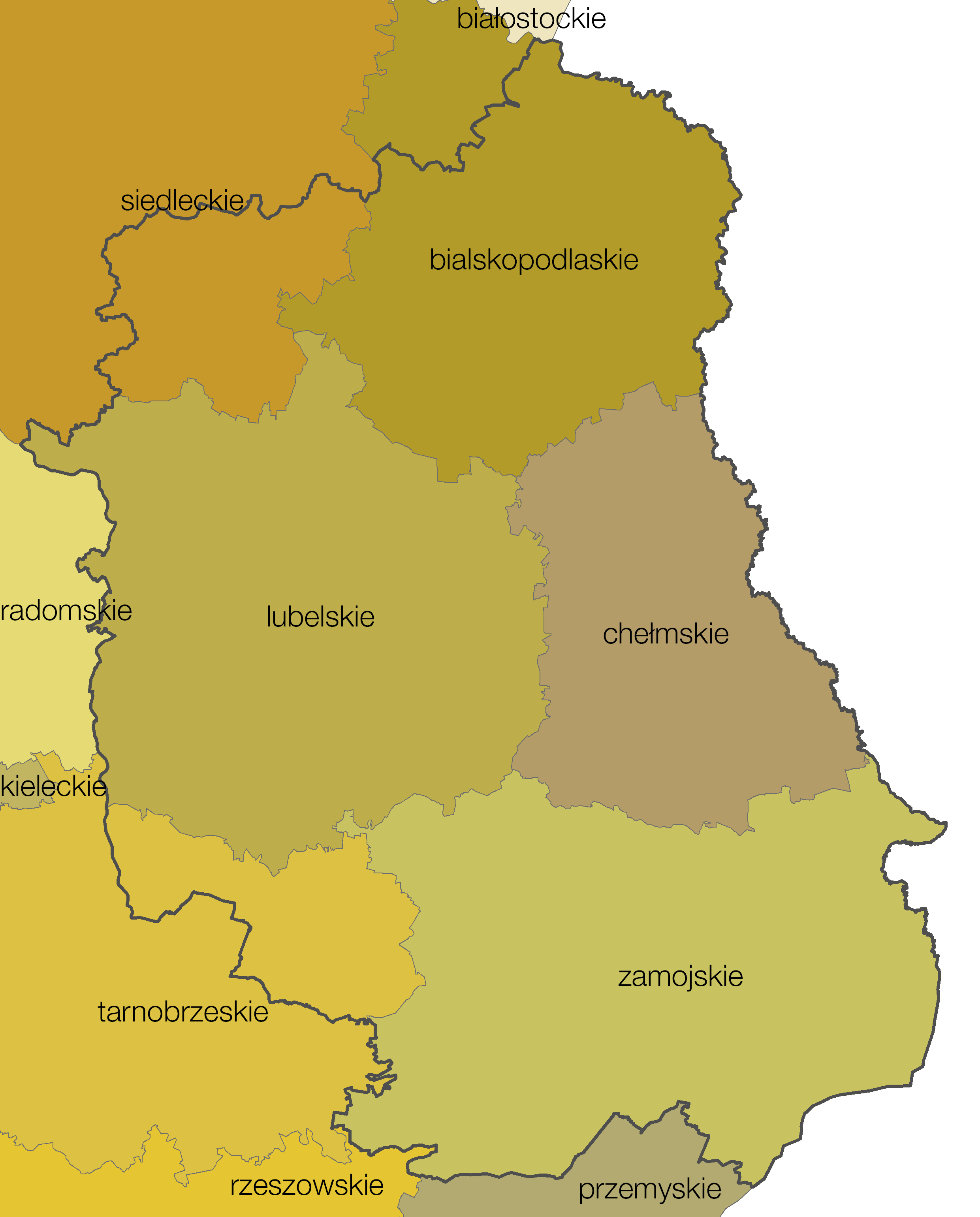 Województwo lubelskie (od 1999) jako powstałe z województw podziału administracyjnego Polski z lat 1975-1998